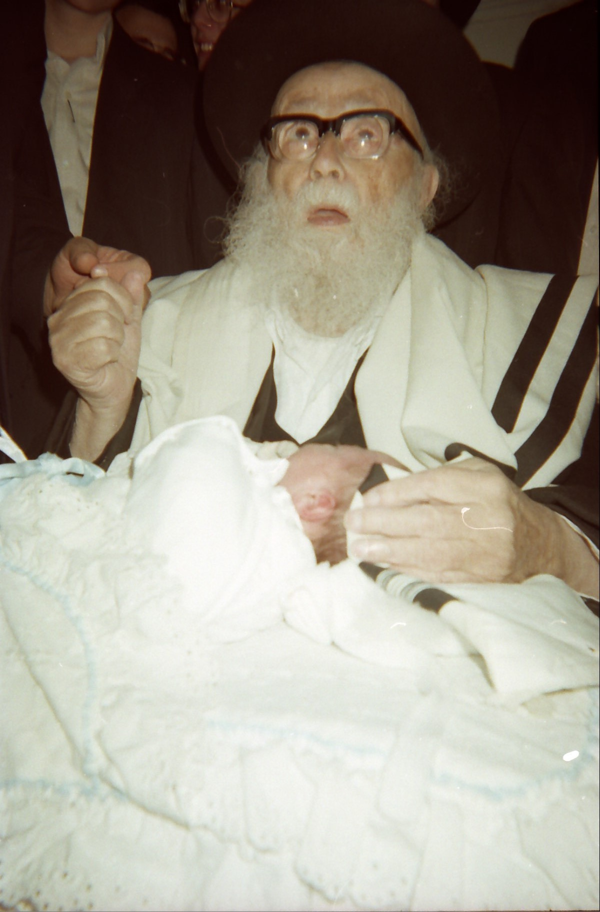 רבי דוד פוברסקי בברית לנינו